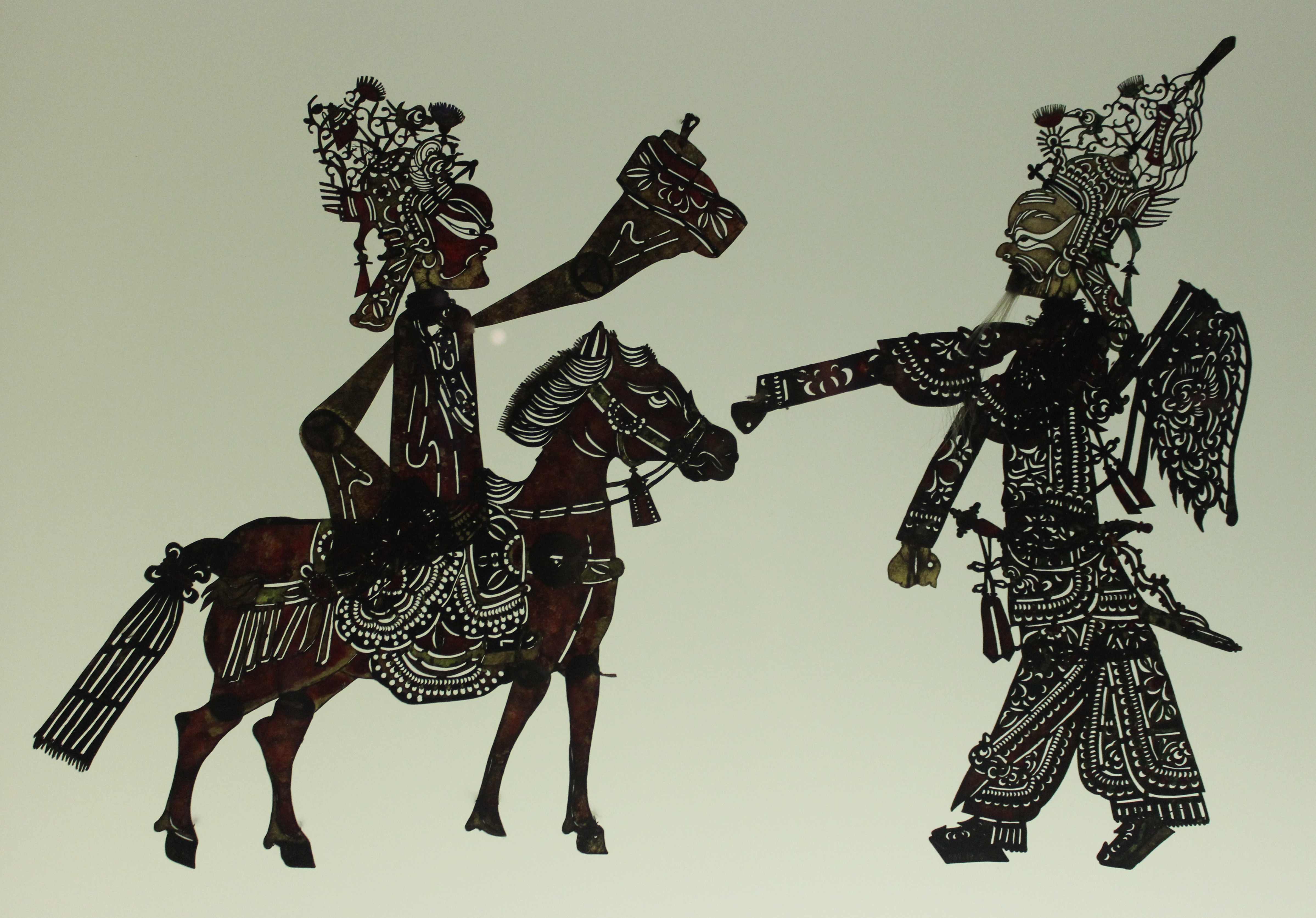 París, Musée du Quai Branly. Figuras del teatro de sombras procedentes del distrito de Hebei, Tianjin.